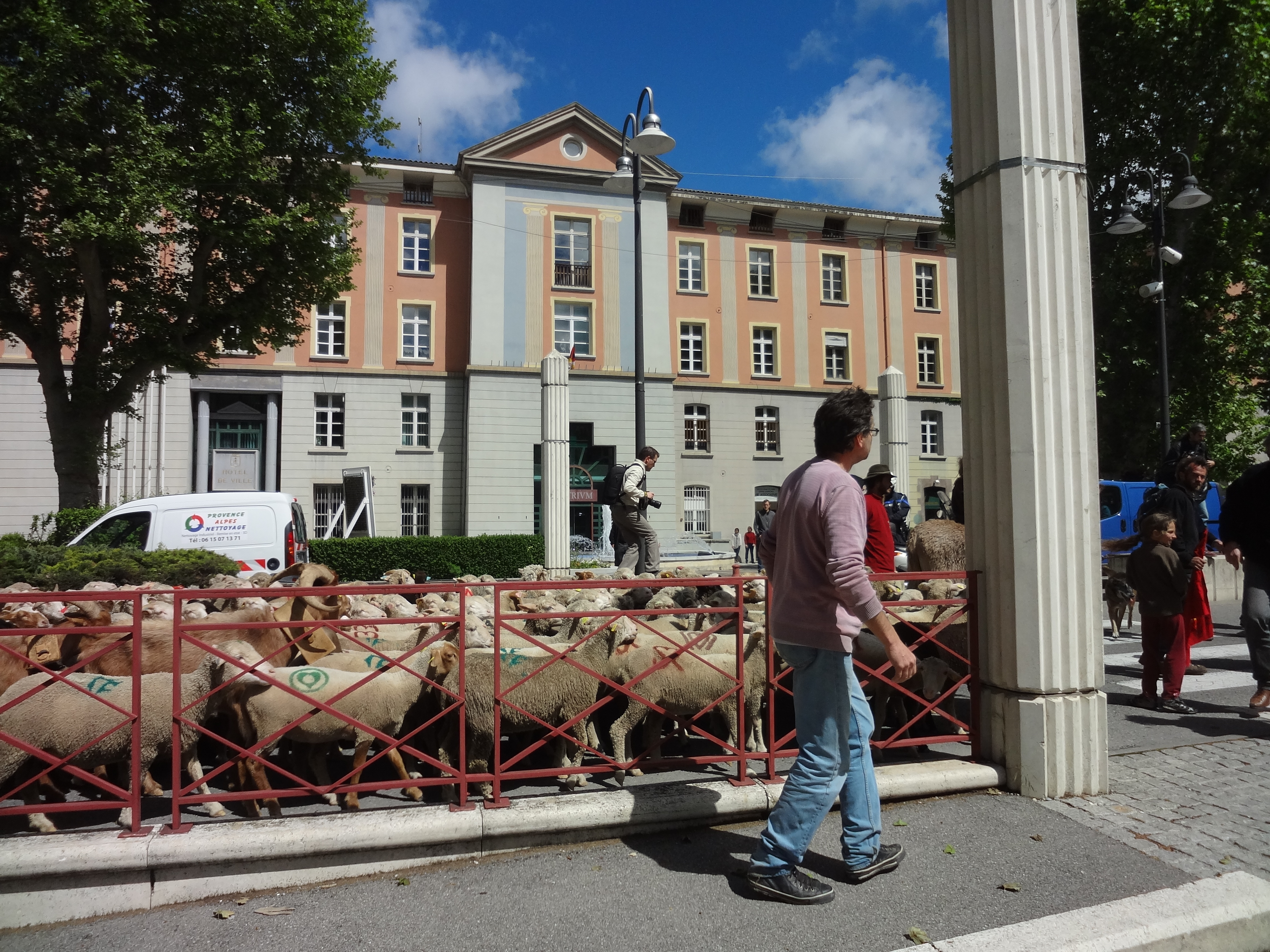 La mairie de Digne-les-Bains et passage de la manifestation Résist'transhumance (contre le puçage RFID des moutons).